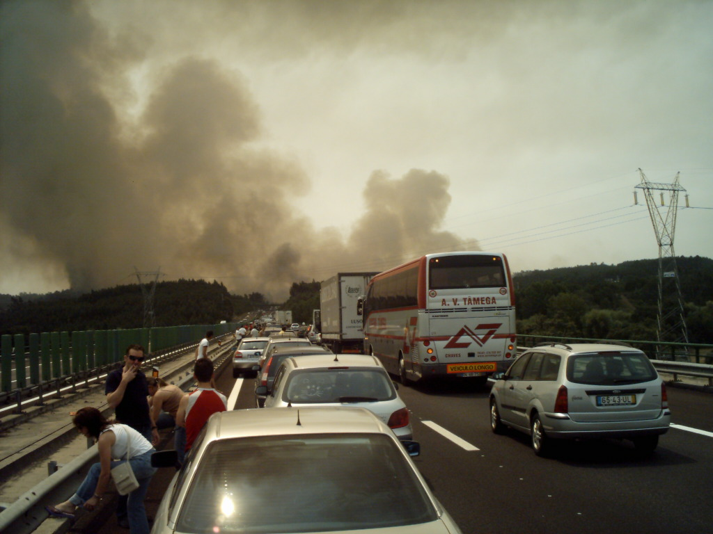 Photo prise par Utilisateur:Leiria au proximité de Leiria sur l'autoroute portugaise A1